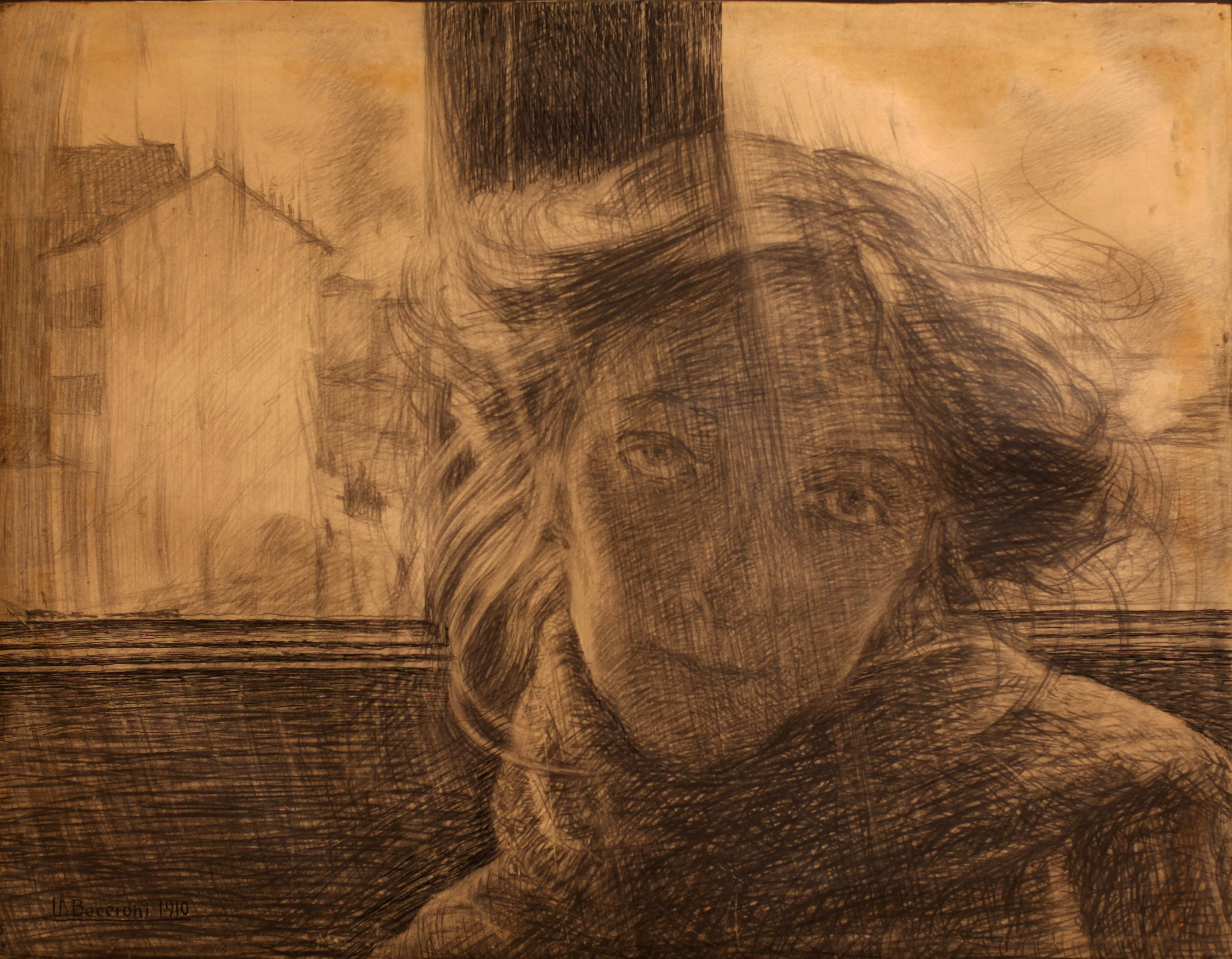 Umberto Boccioni (1882-1916) Controluce (1910), matita grafite e inchiostro nero su carta, fotografato al useo del Novecento di Milano